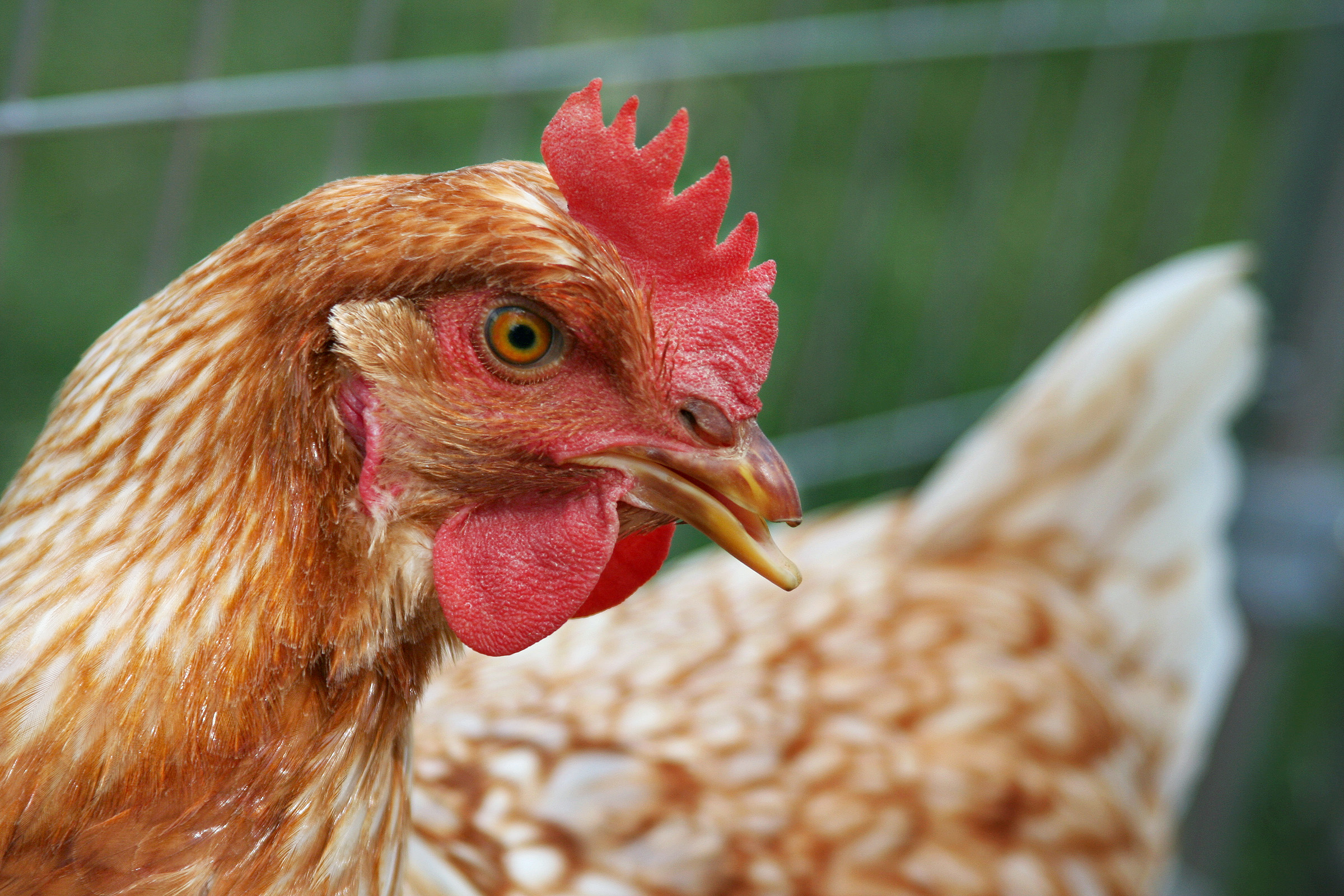 A hen chicken (Gallus gallus)